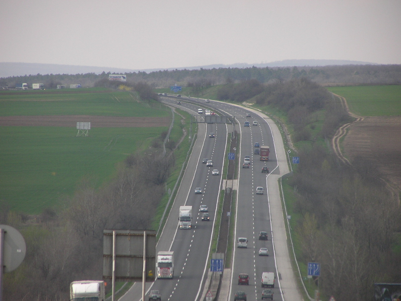 Die Autobahn M1 nach Budapest in Richtung Wien.